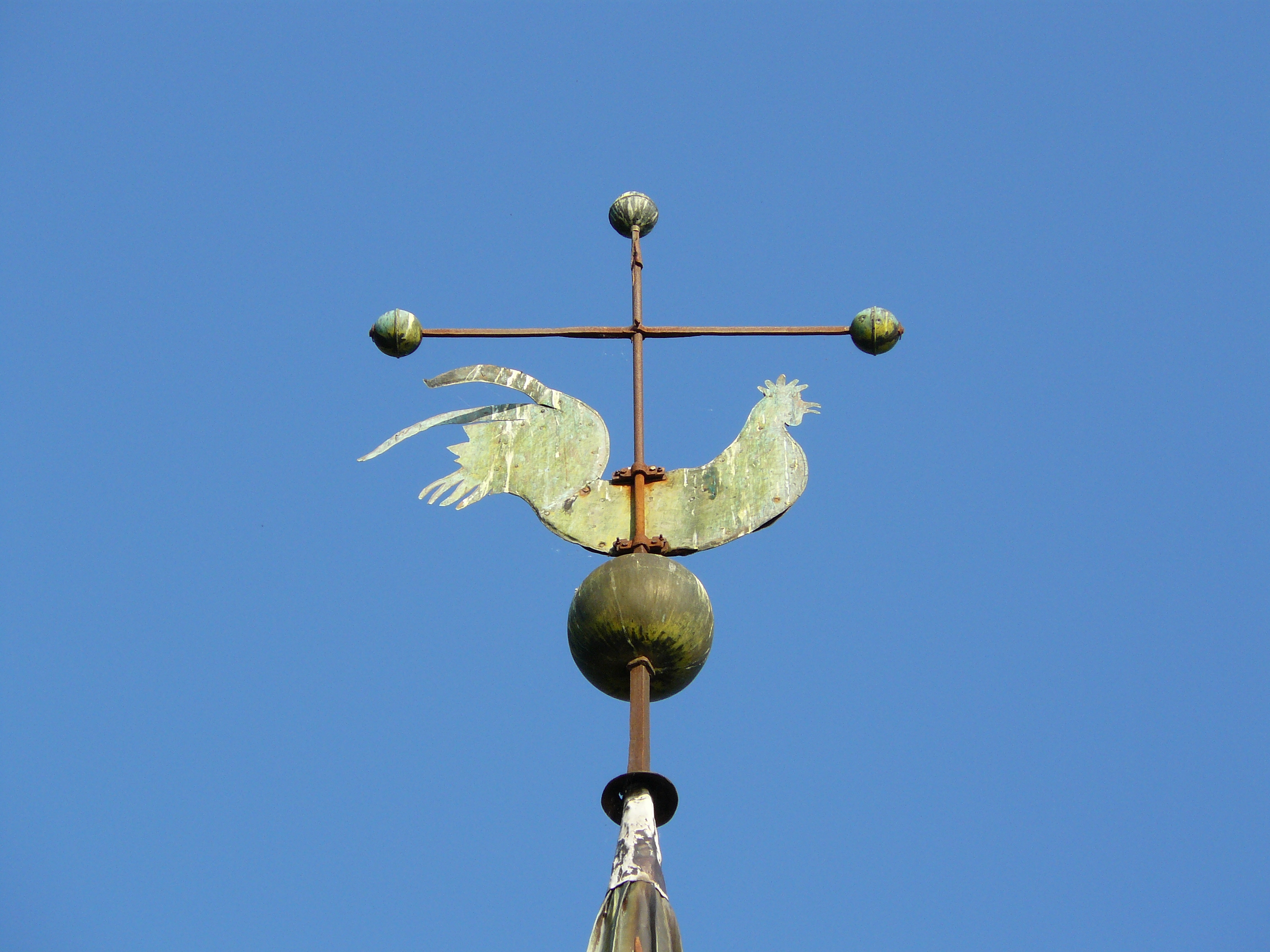 Vereide church - weathercock.jpg